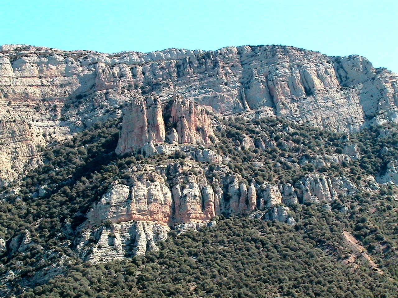 Paret sud del Peladet